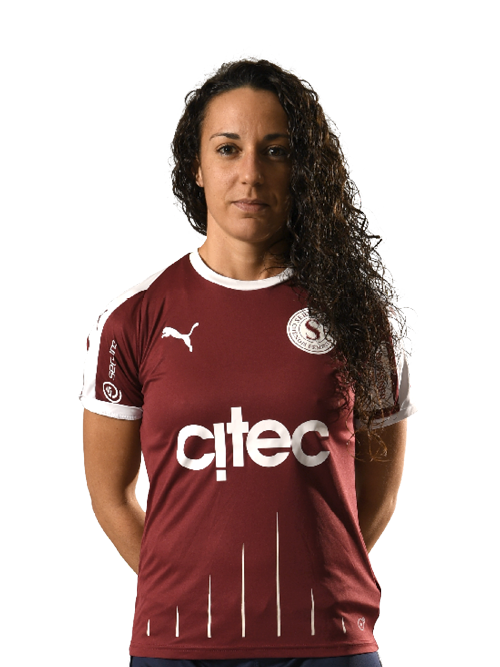 Photo portrait de la licence de jeu 2019-2020